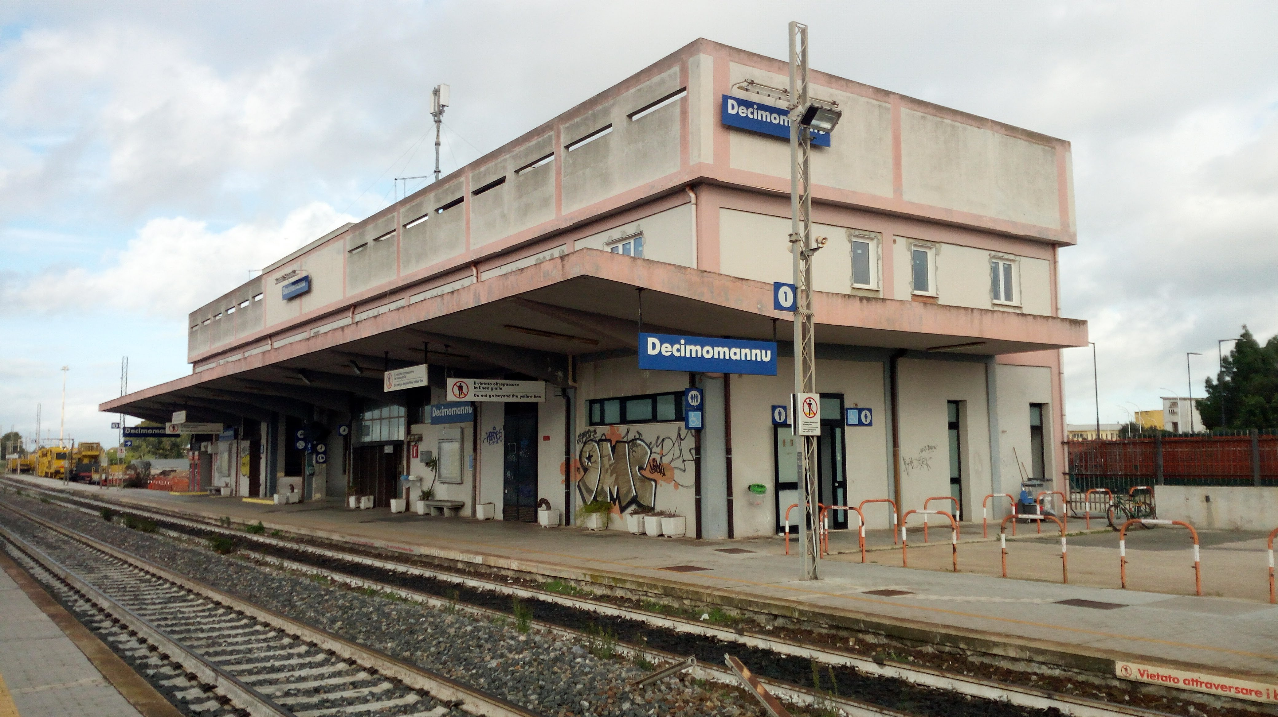 Il Fabbricato Viaggiatori della Stazione di Decimomannu visto dal marciapiede dei binari 2 e 3.